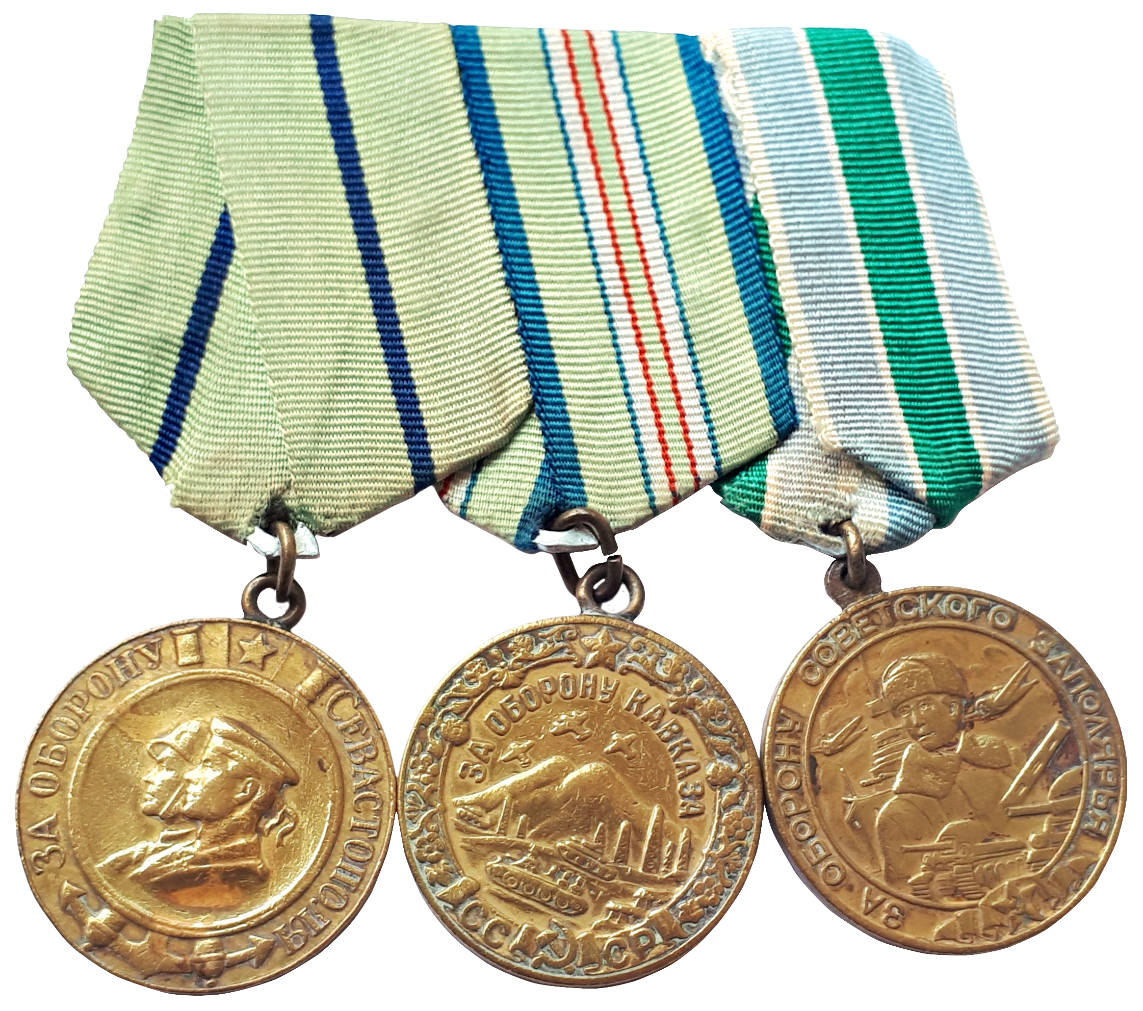 Cəlil Cavadovun döyüş medalları